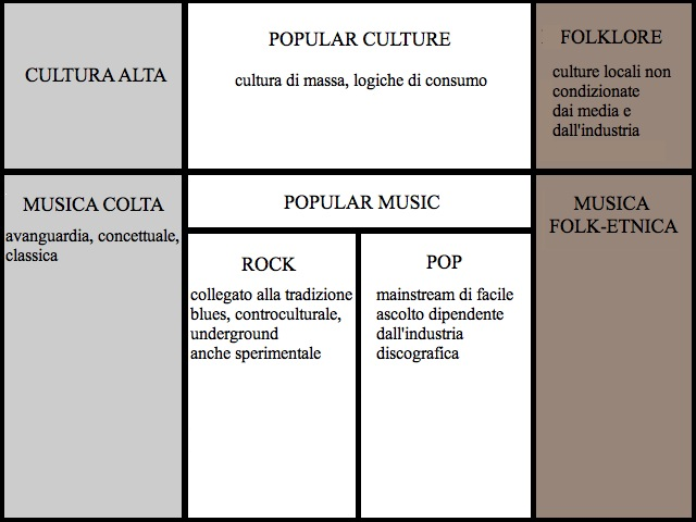 Schematizzazione della musica popular